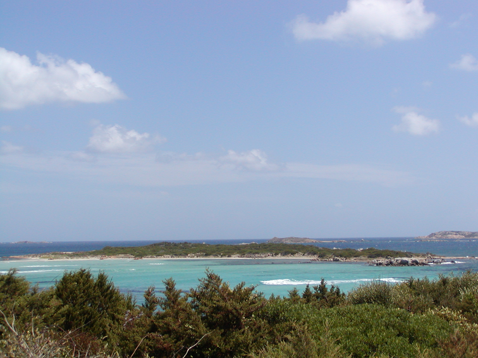 Isula Piana, In Corsica